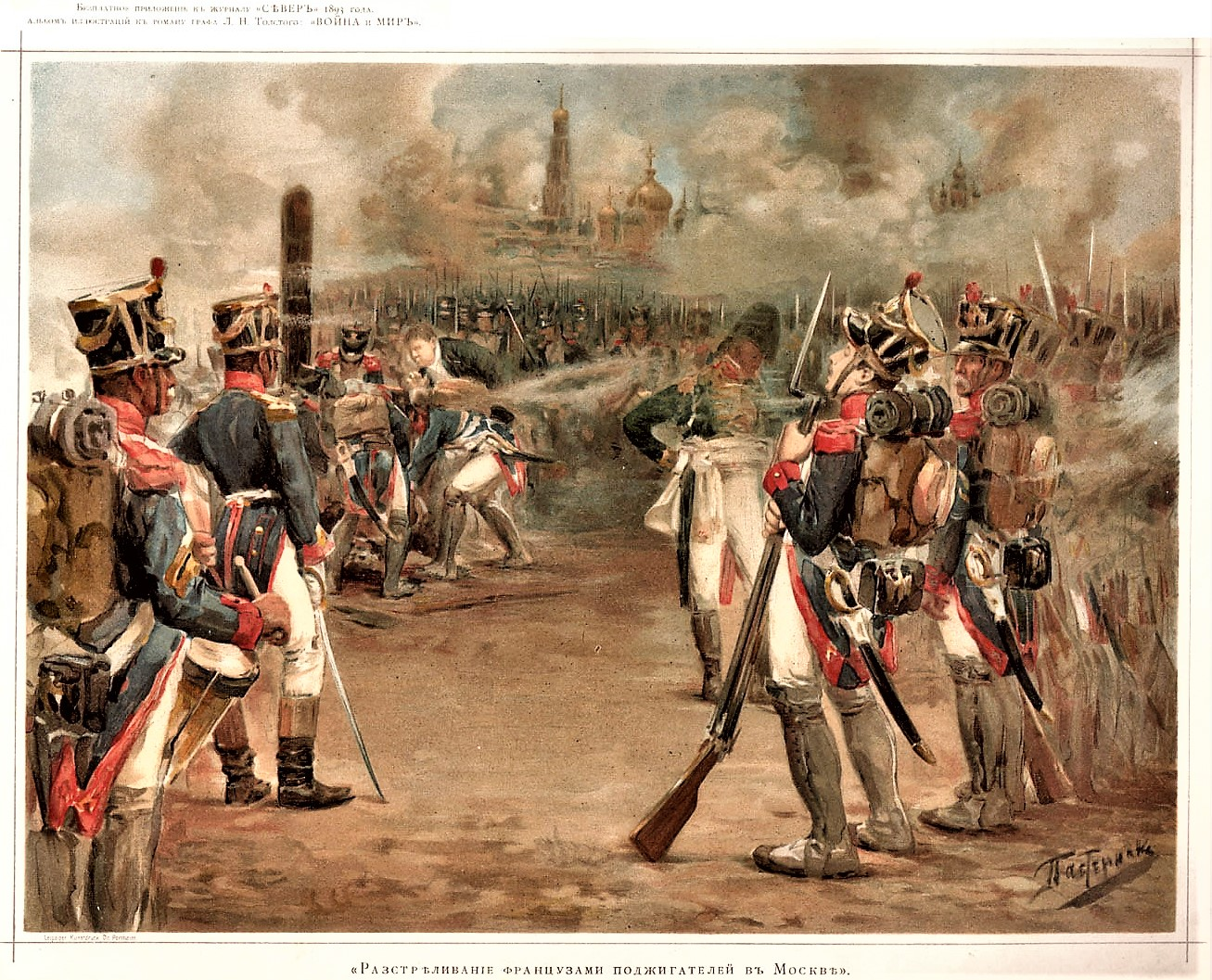 Расстреливание французами поджигателей в Москве. Акварель Л.О. Пастернак